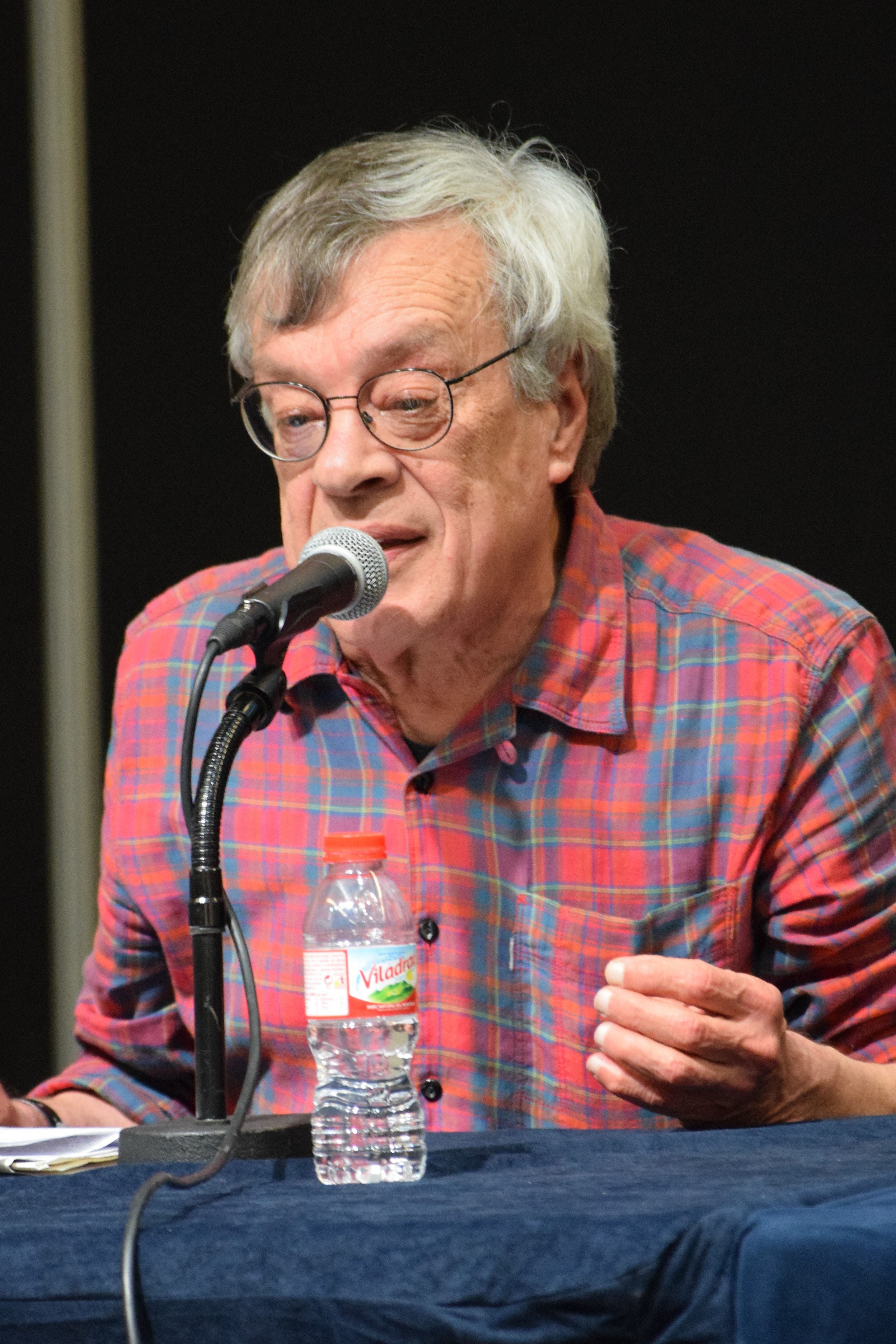 El dibuixant argentí José Muñoz parlant a la taula rodona "El personatge d'Alack Sinner quatre dècades després". Saló Internacional del Còmic de Barcelona de 2017. Dissabte 01 d'abril de 2017.